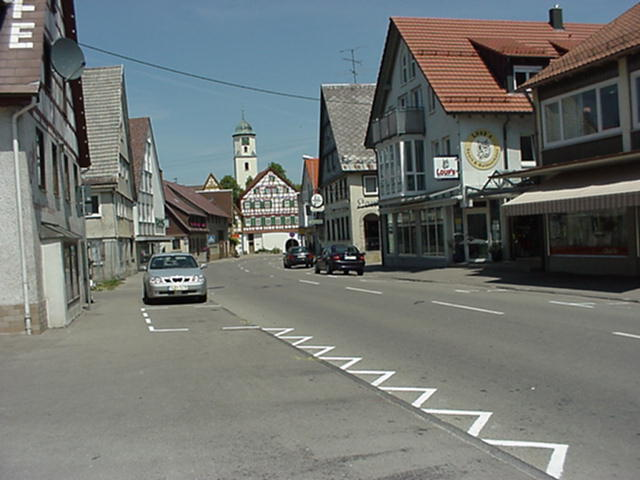 Laichingen, pohled z náměstí severním směrem k evangelickému kostelu